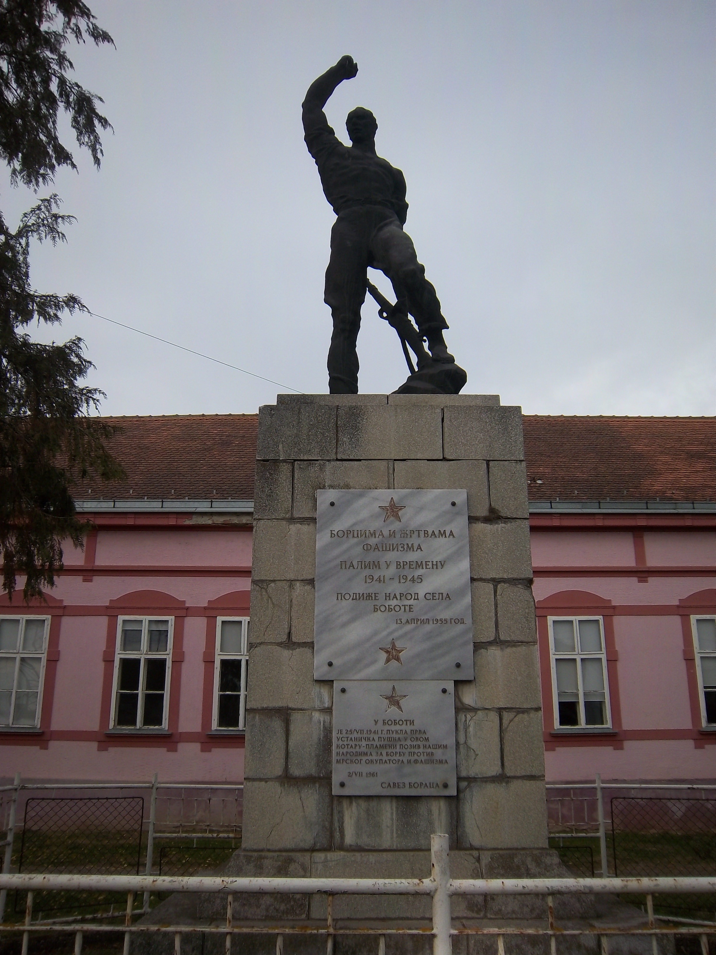 Spomenik borcima NOB-a u Boboti (Općina Trpinja), u Republici Hrvatskoj